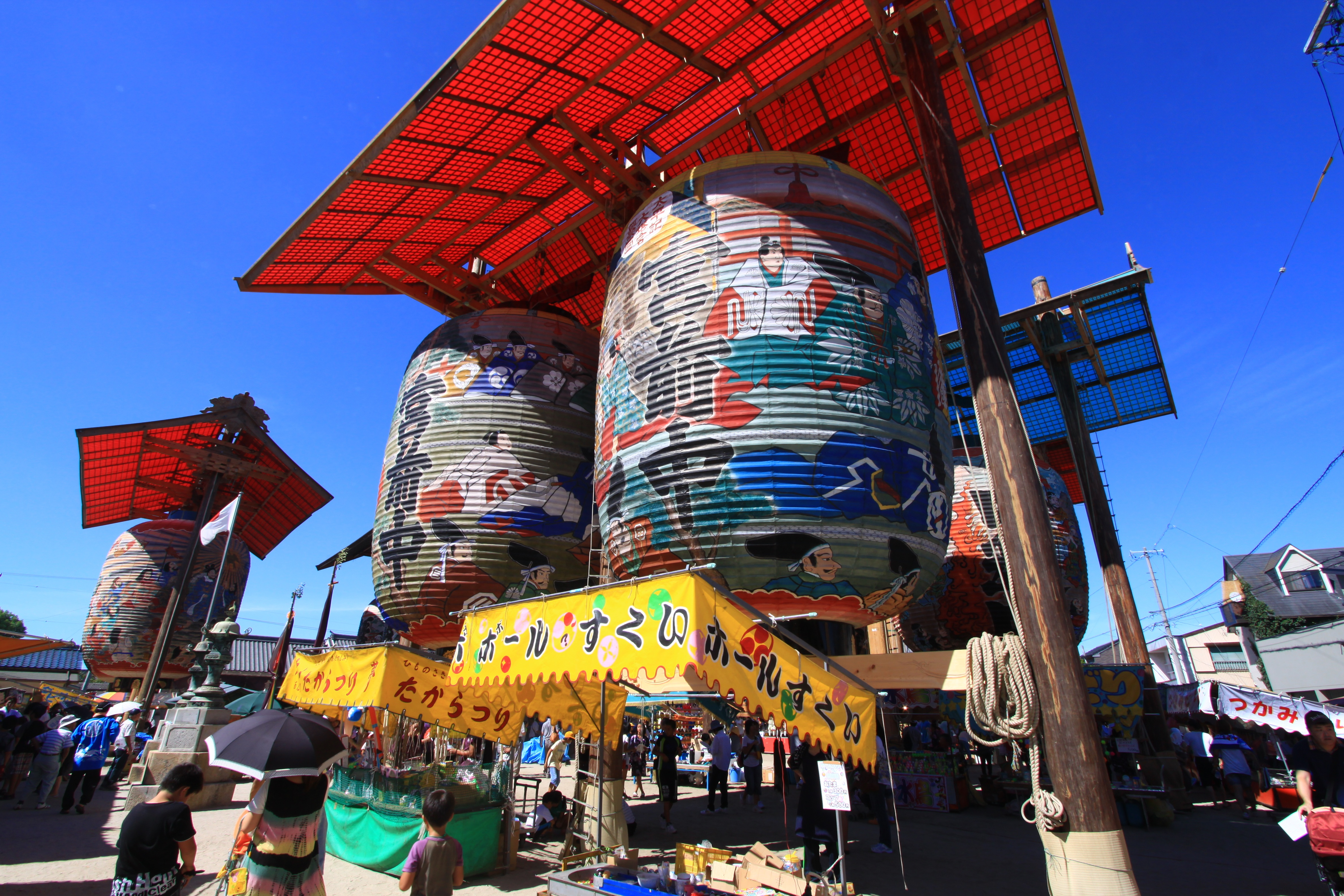 一色大提灯祭り (愛知県西尾市一色町)